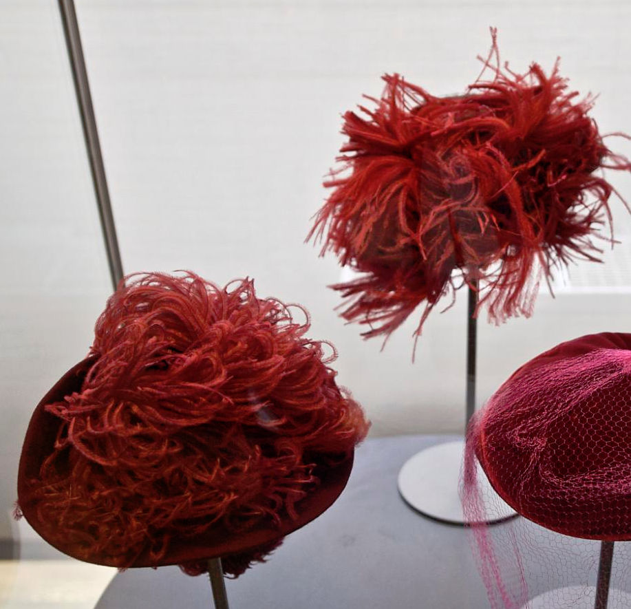 Trois chapeaux rouges dont deux à plumes photographiés à l'occasion de l'exposition Aussi rouge que possible (19 mars 2008 - 1er novembre 2009) au Musée des Arts Décoratifs, Paris, France. Au fond, par Rose Descat, modiste à Paris: Toque en réseau marron et plumes rouges entremelées d'une voilette marron drapée, vers 1932/1938, plume d'autruche teintée, résille de Nylon, Inv. UF 59-5-4, Musée des Arts Décoratifs, Paris, France.